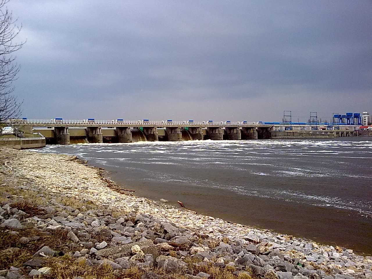 Włocławek,Poland (barrier dam)